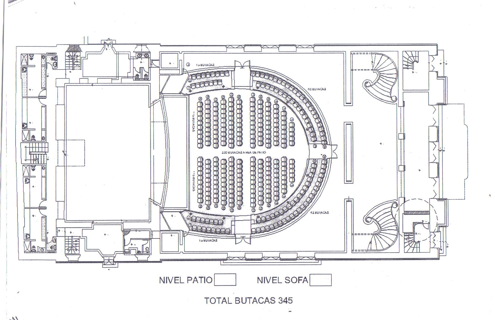 planta del Teatro Nacional de Caracas. Platea o patio, lobby y escenario